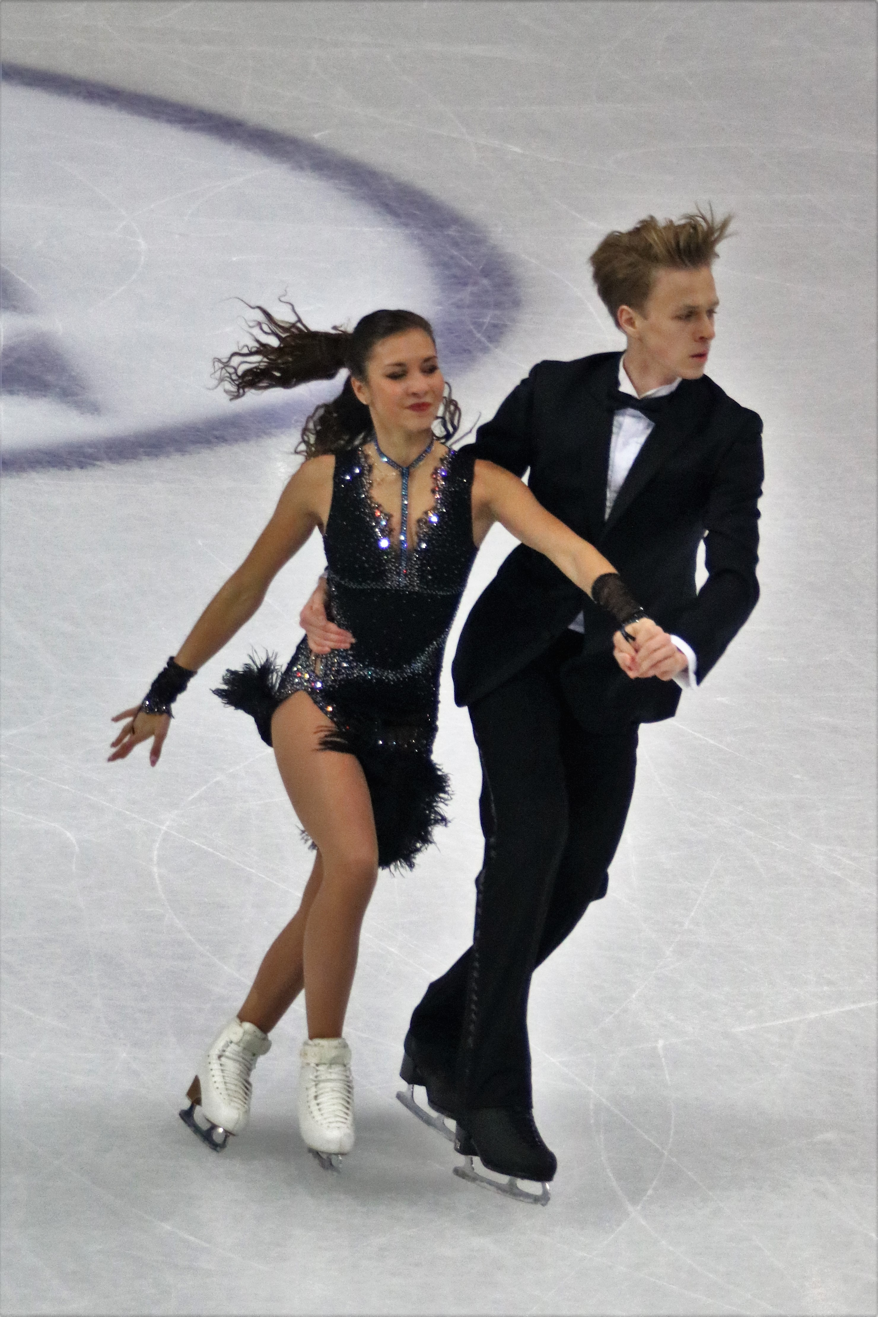 Диана Дэвис / Глеб Смолкин (Россия) на финале юниорского Гран-при 2019-2020